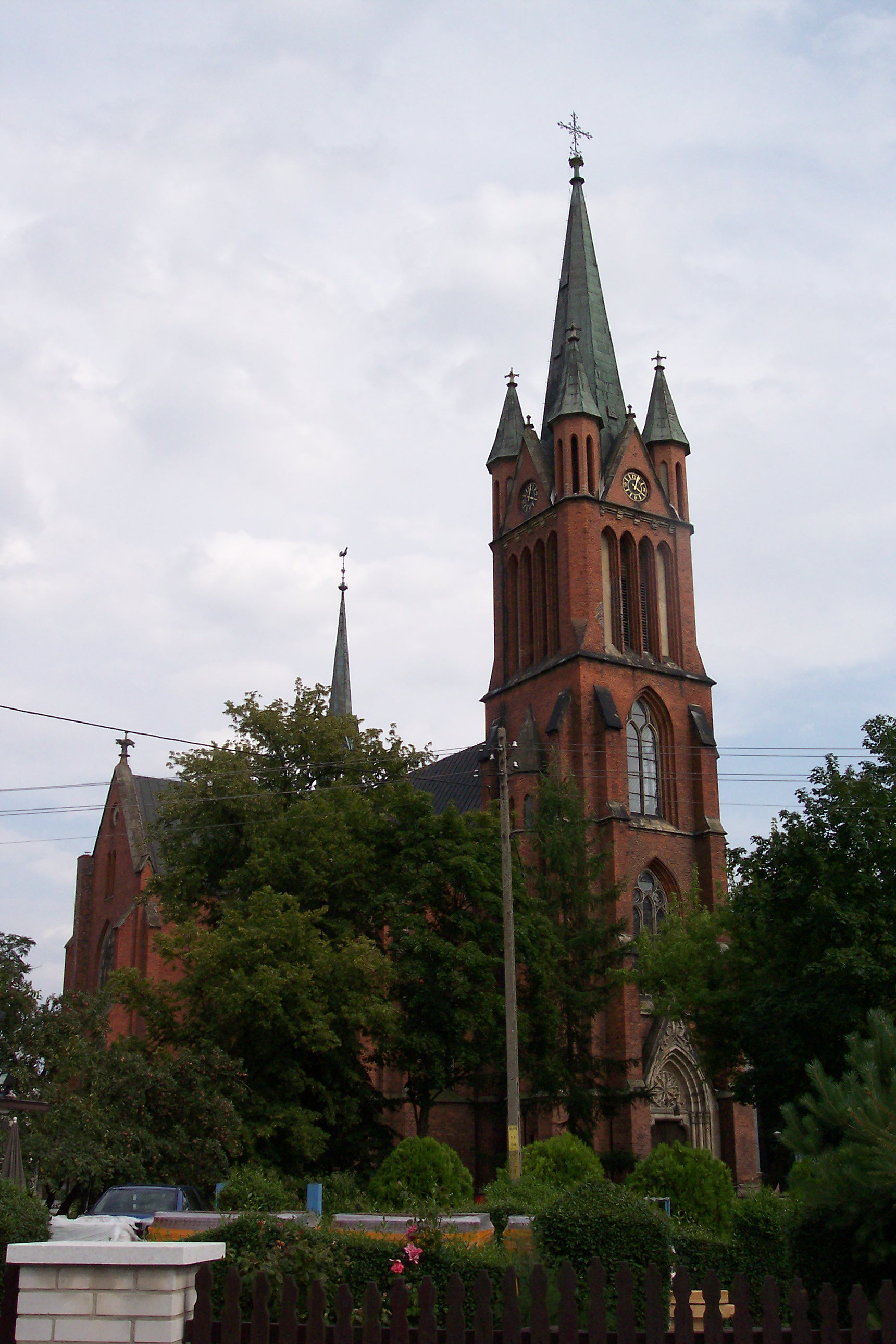 Kościół pw. św. Katarzyny Aleksandryjskiej w Kędzierzynie-Koźlu (dzielnica Sławięcice)